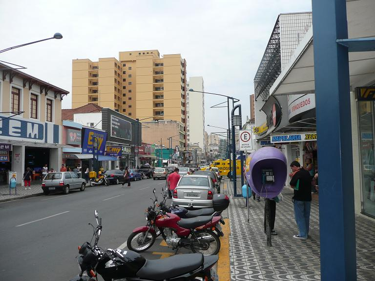 Esta foto foi tirada por mim no dia 24/09/2007 na rua Assis figueiredo em Poços de caldas - Minas Gerais